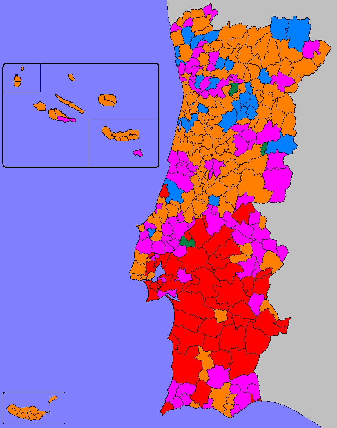 Mapa ilustrativo do partido mais votado por Concelho (Câmara Municipal)